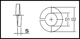 DIN 7980